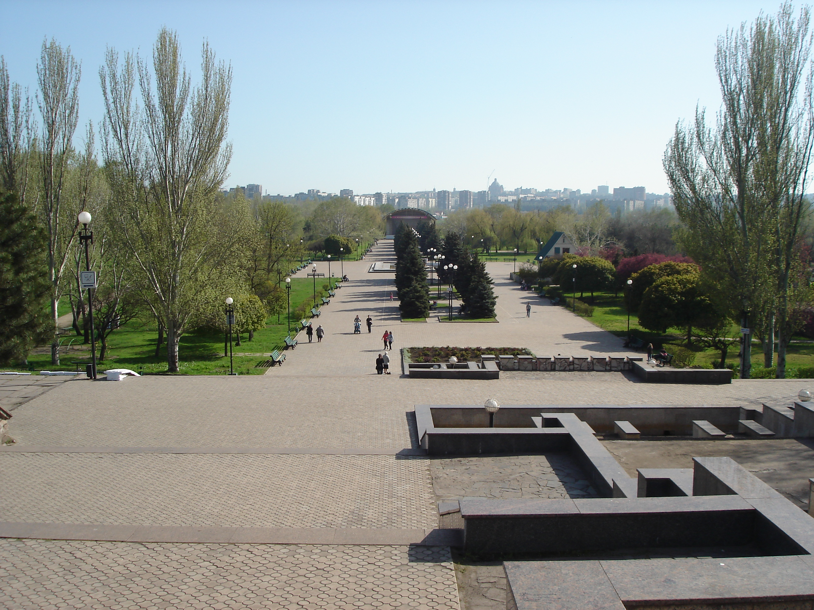 Парк имени Гурова (Лугопарк)